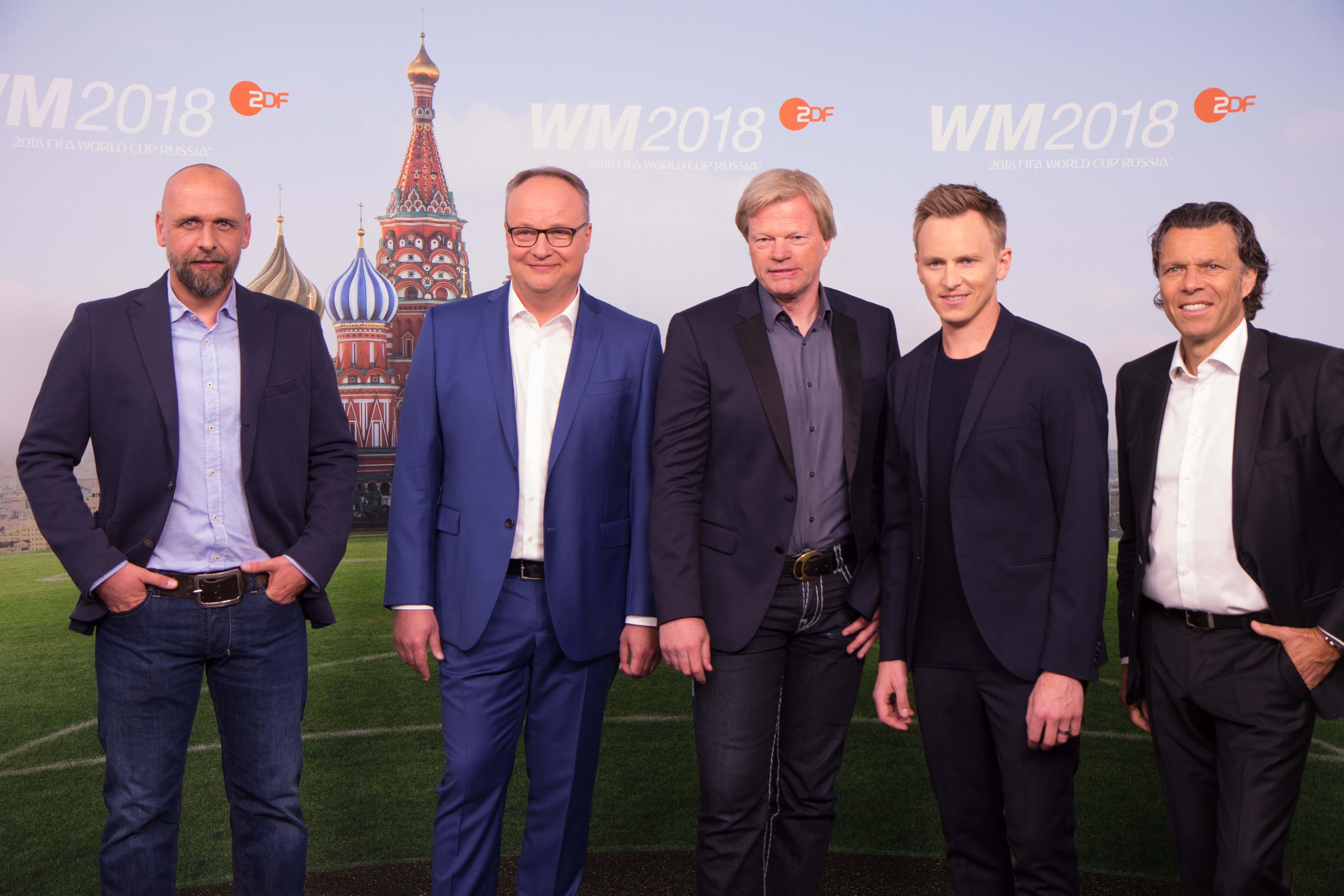 FIFA WM 2018 Pressevorstellung von ARD und ZDF in Hamburg